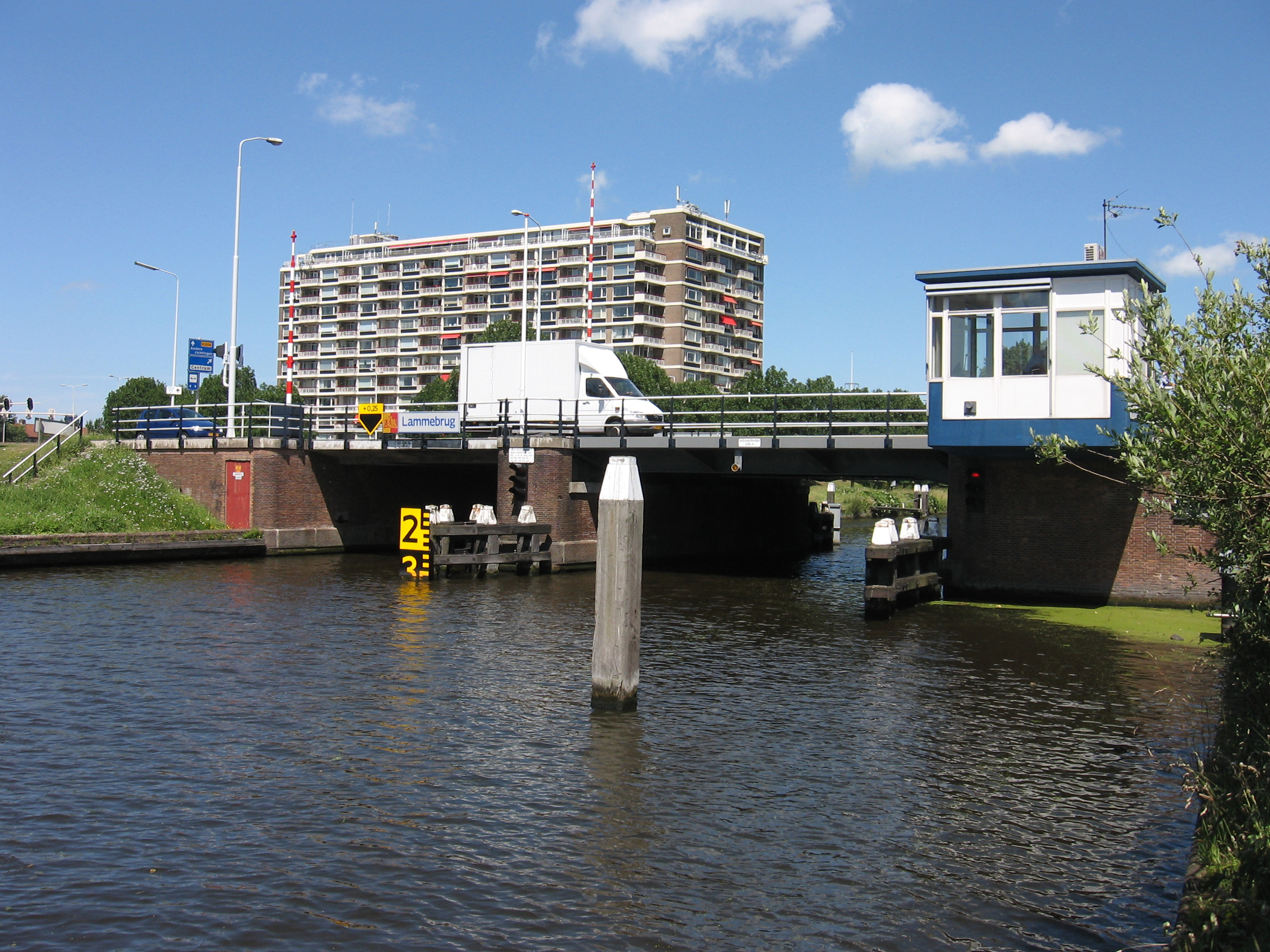 Lammebrug, Leiden